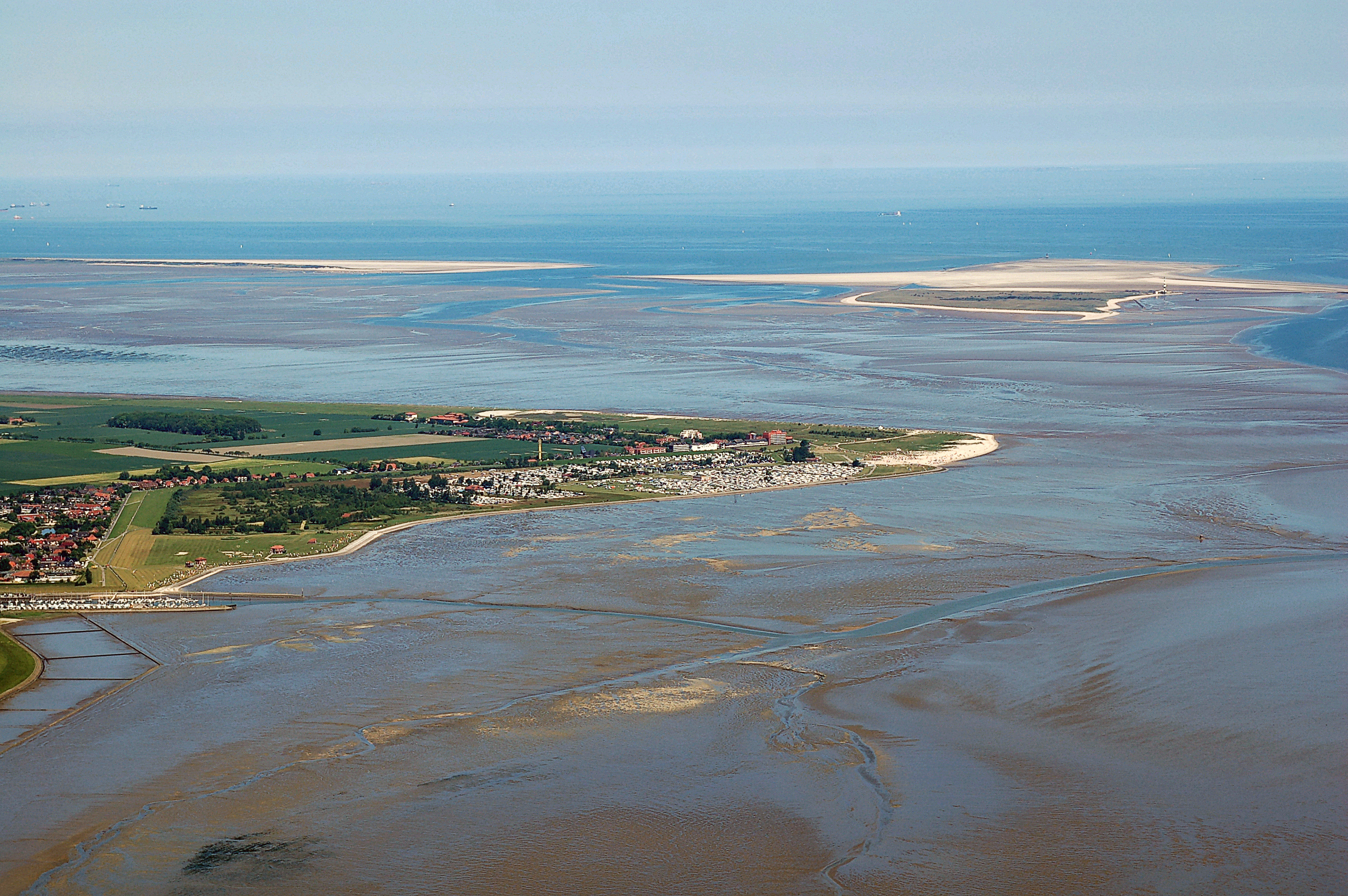 Luftbilder von der Nordseeküste 2012-05